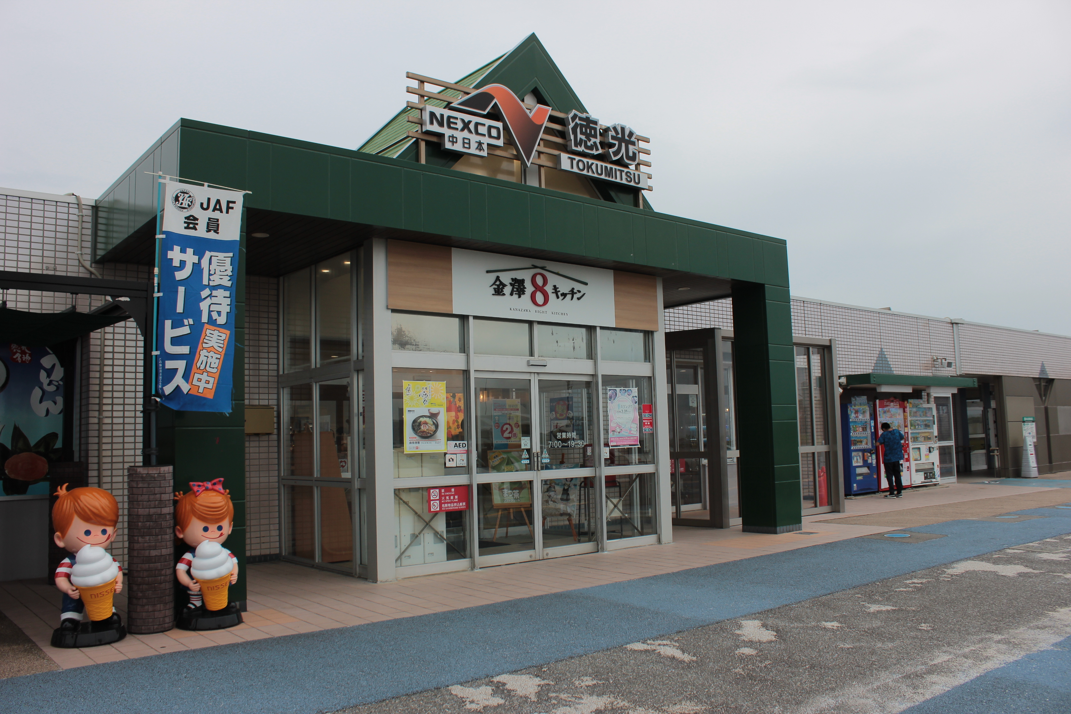 徳光パーキングエリア（上り、米原方面） Canon EOS Kiss X5